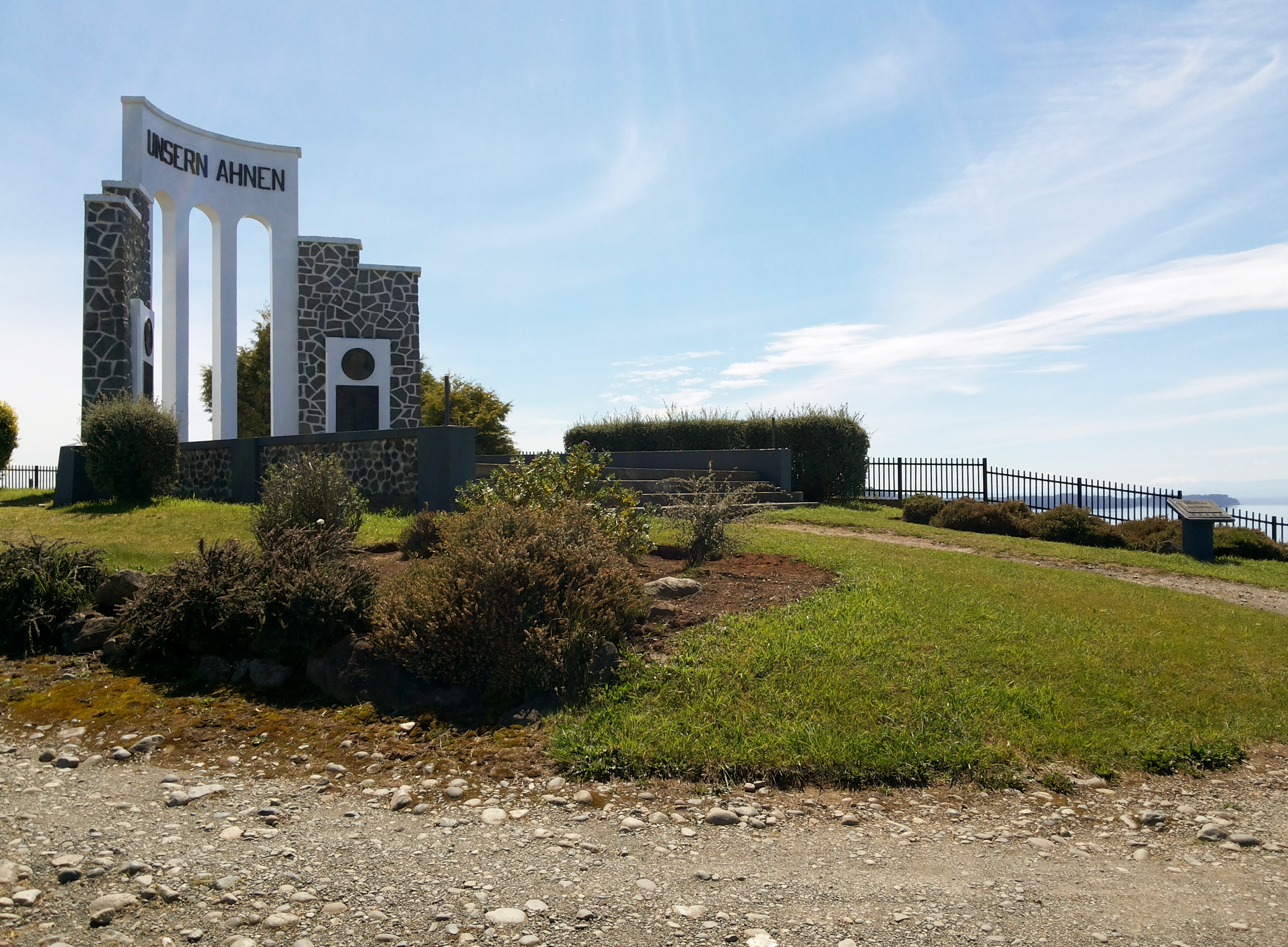 Monumento a los colonos alemanes en Llanquihue Unsern Ahnen, conocido también como Monumento a nuestros antepasados. Construido en 1937, está ubicado sobre una colina en el sector de Totoral, en la comuna de Llanquihue, Chile